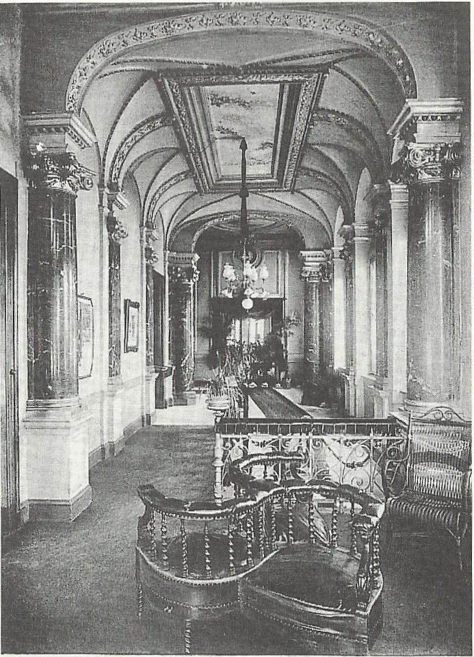 Eingangshalle des Hotels Monopol, Königswinter